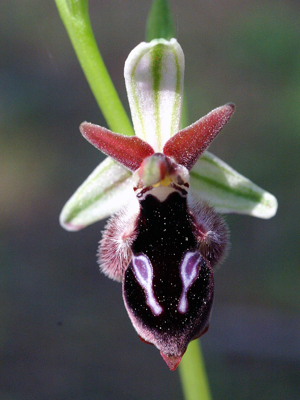 Ophrys reinholdii flower